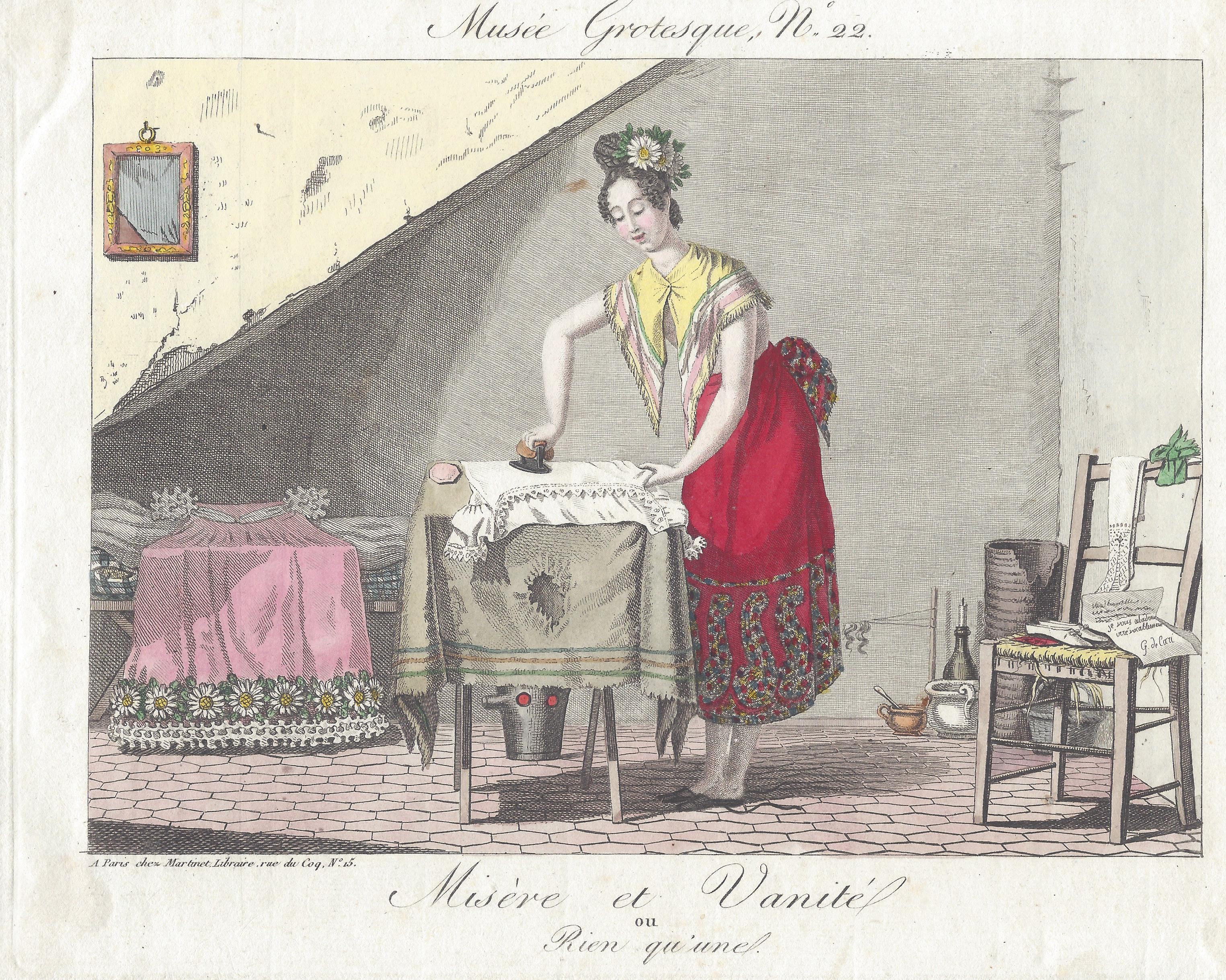 Aaron Martinet (1762-1841): Musée grotesque Blatt 22: Misère et Vanité. Kolorierter Kupferstich.